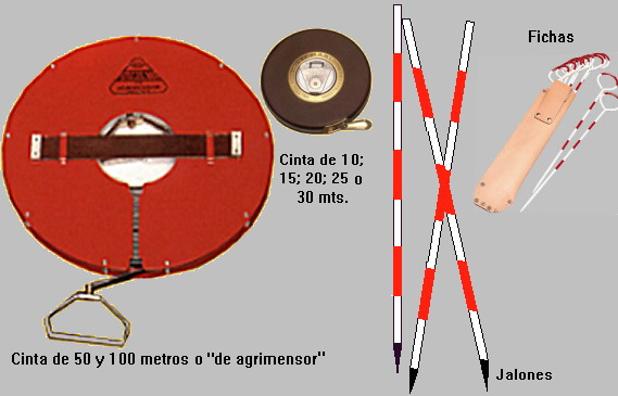 Elementos de medición con cinta métrica